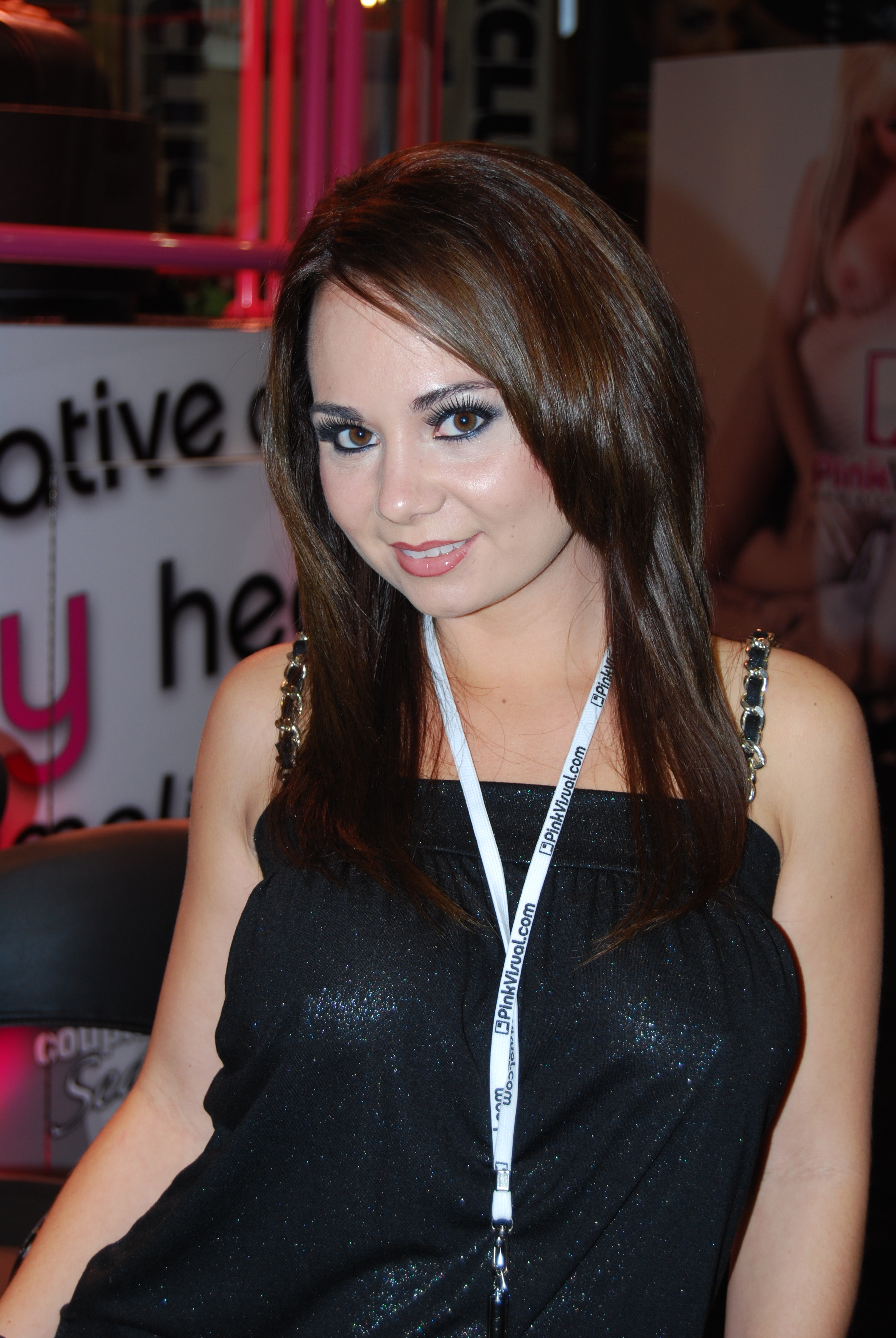 AEE2008_Nikon_Day2 058